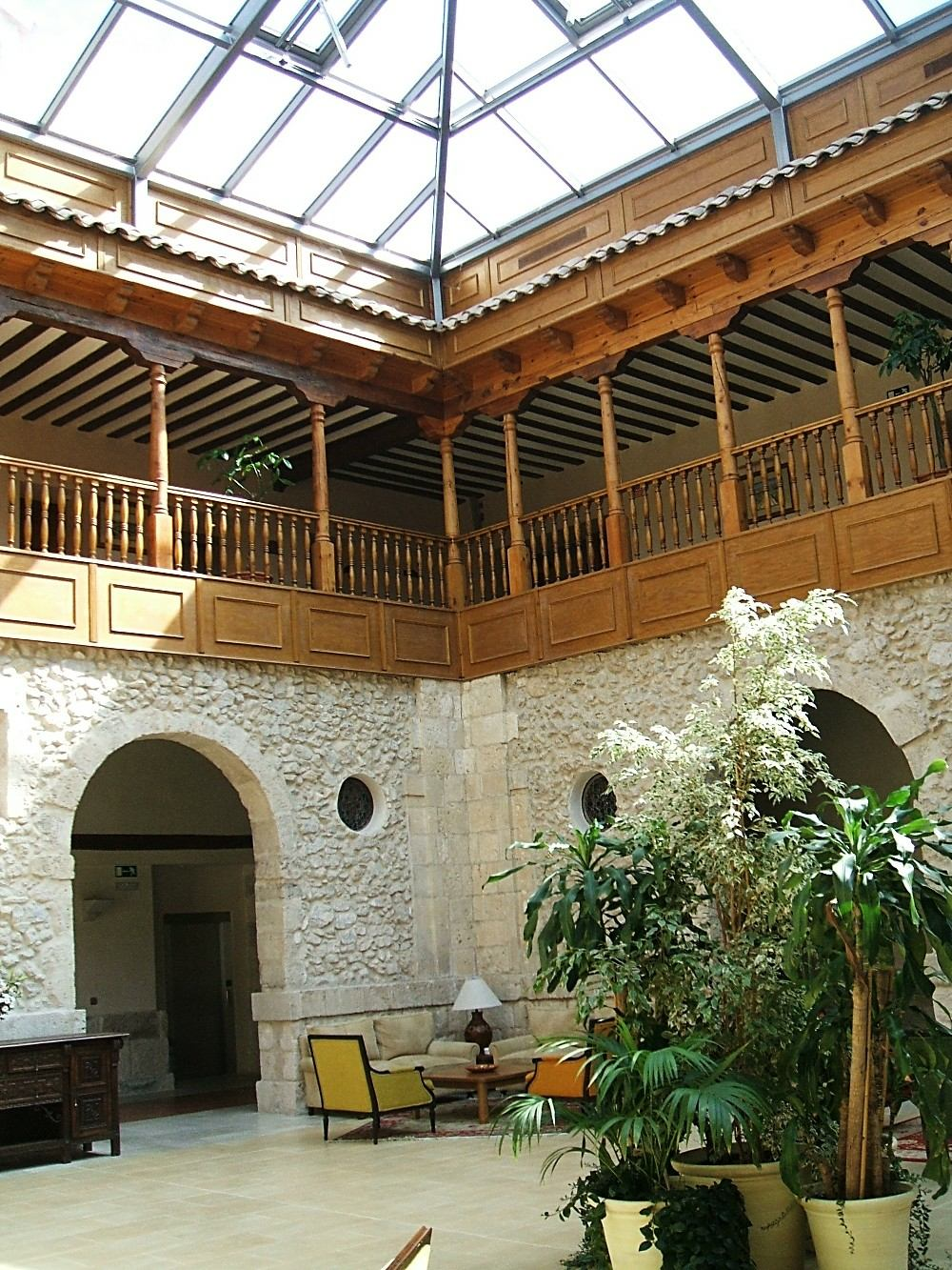 Claustro del antiguo Convento de Santa Clara, en Peñafiel, Valladolid, España, rehabilitado para dependencia hotelera